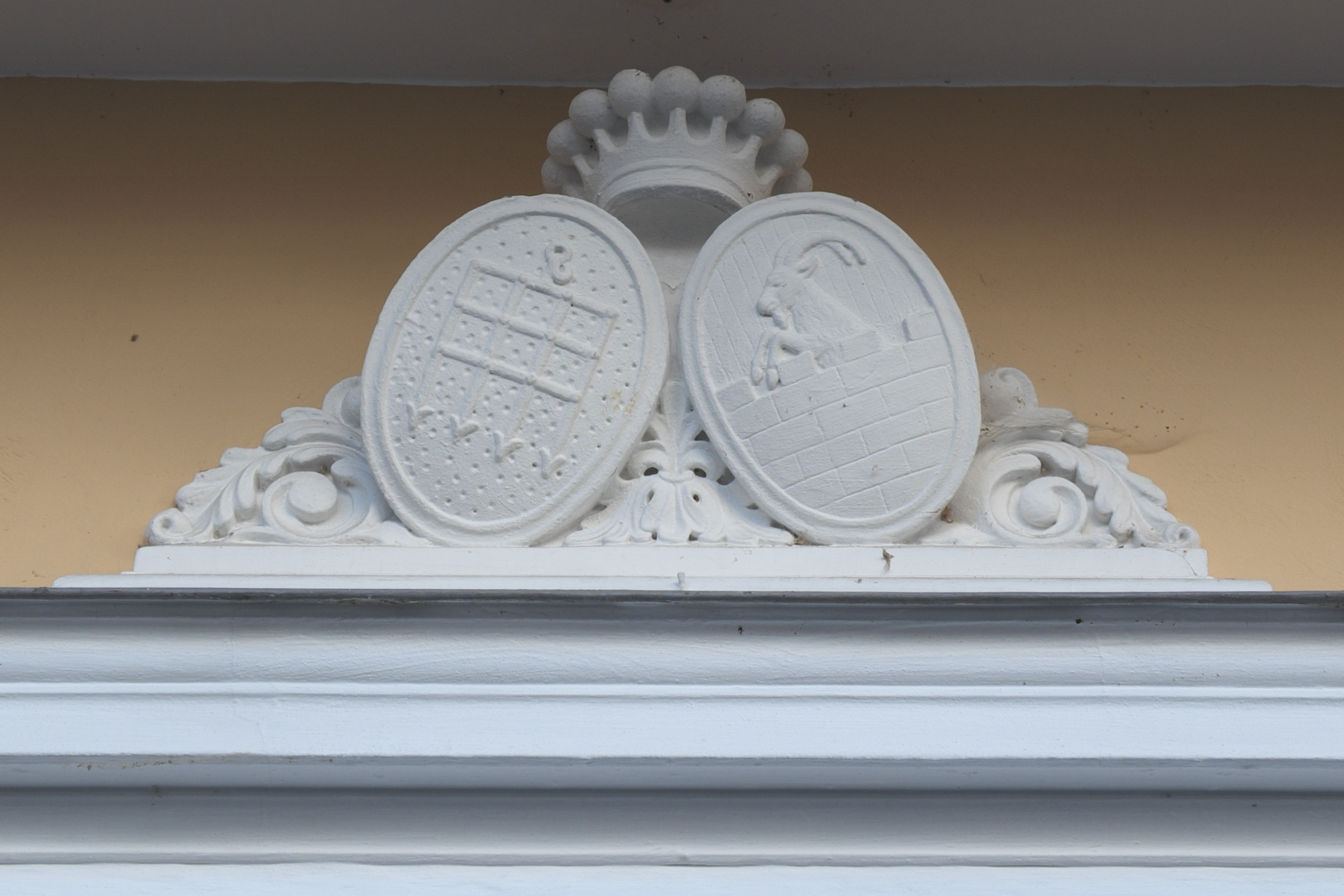 Schloss Gatterburg in Pasing im Stadtbezirk Pasing-Obermenzing in München (Bayern/Deutschland), Stuckdekor